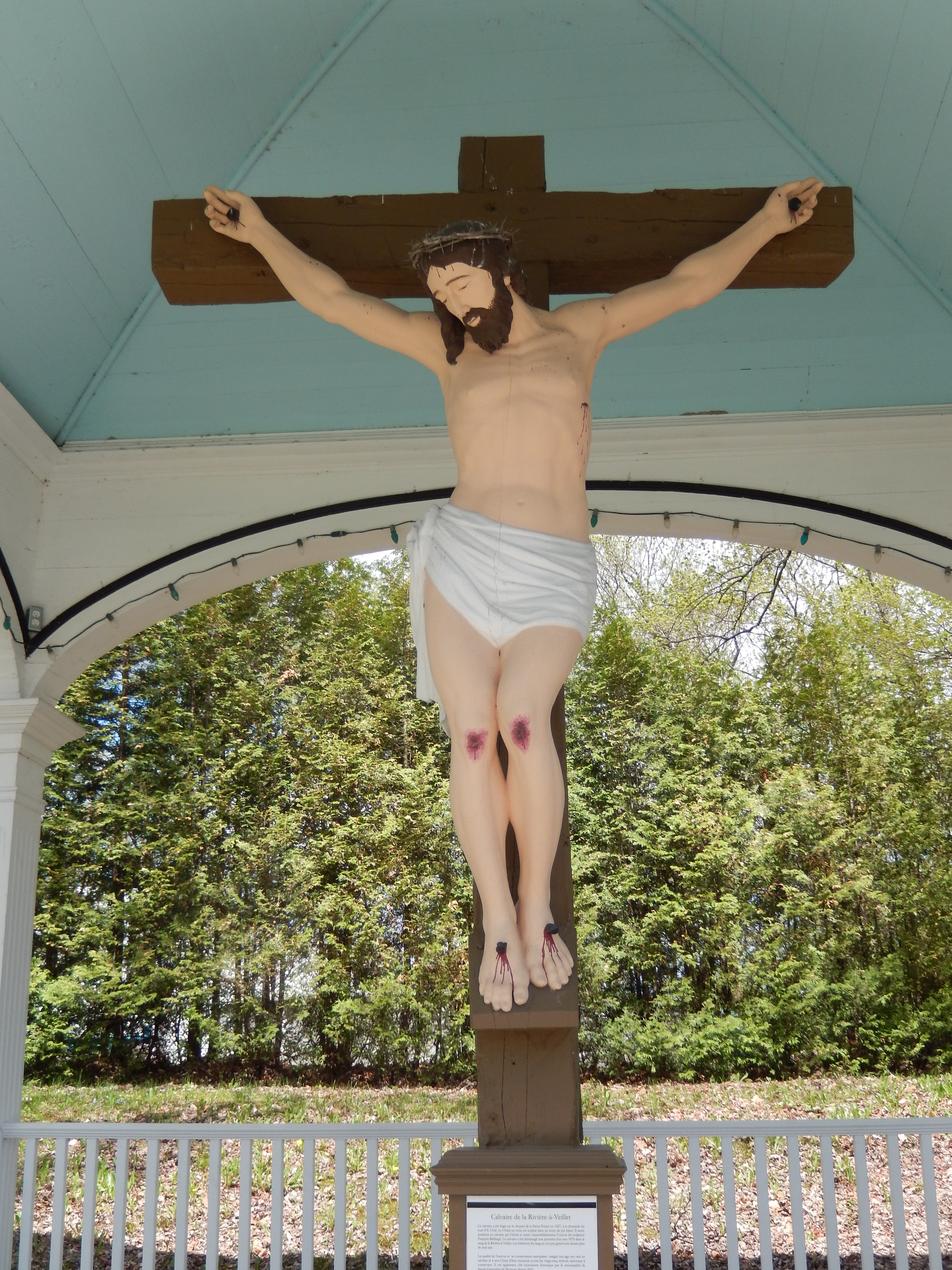 Calvaire de la Rivière-à-Veillet, Rue Principale, Sainte-Geneviève-de-Batiscan (Canada). (Protection IP cité. Voir la liste des lieux patrimoniaux de la Mauricie pour plus de détails).